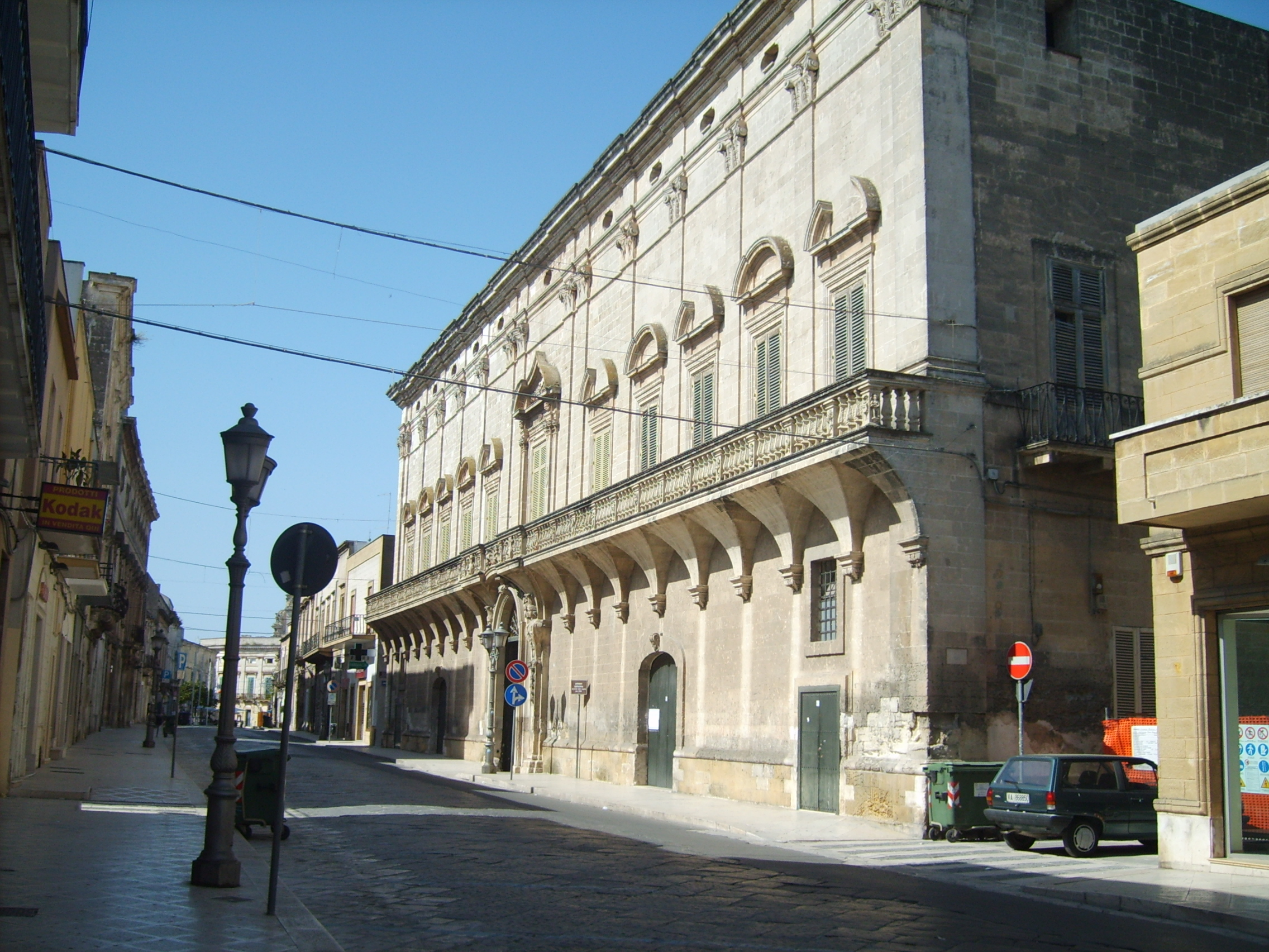 Palazzo Carissimo